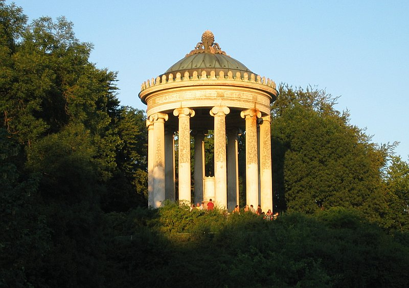 Monopteros, Englischer Garten (München)